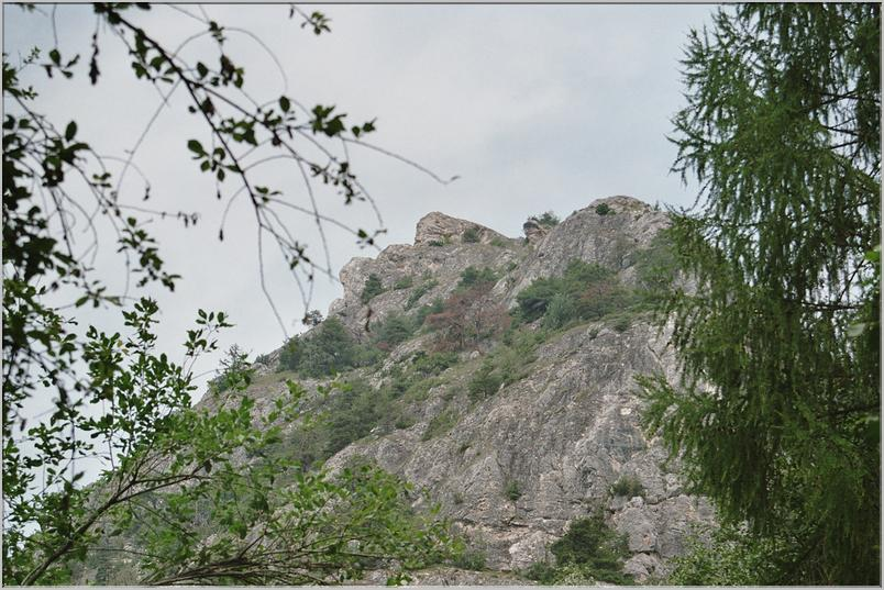 Photographie du géant couché de Nax par Hervé Grand en Juillet 2005.